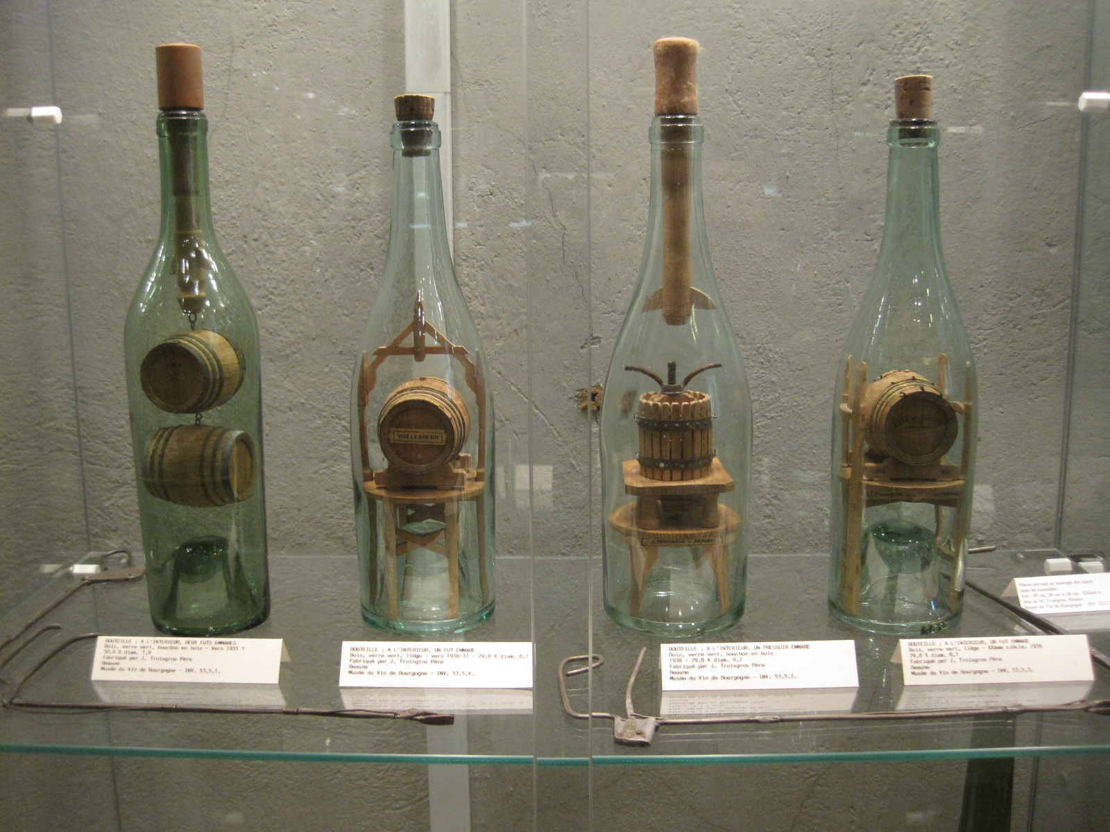 Hôtel des ducs de Bourgogne (Beaune)